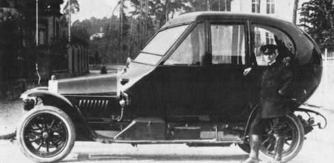 Scan eines alten Familienfotos . Opel 13/30 PS mit Stromformkarosserie für Max Lochner